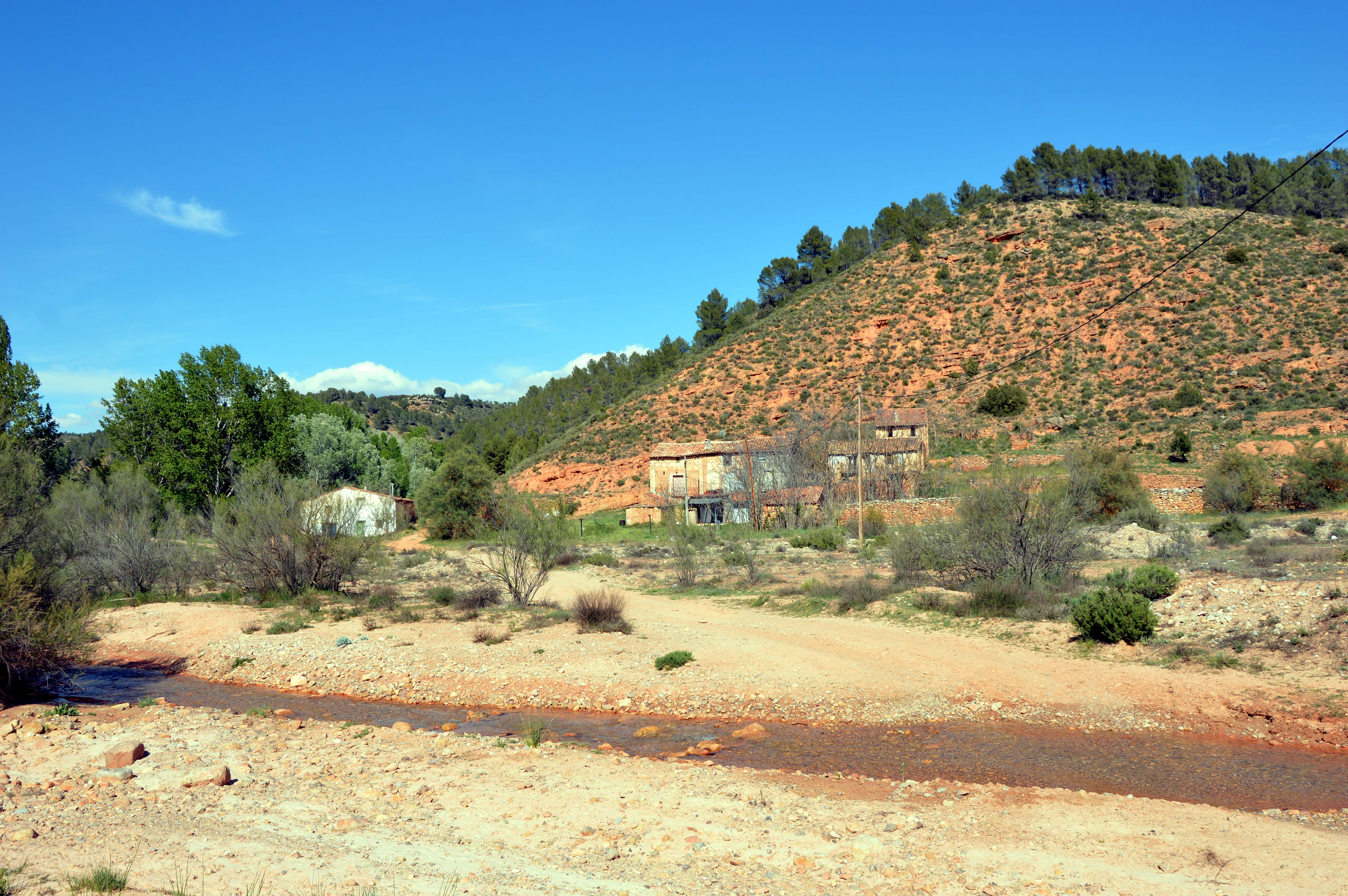 Vista del tramo final del río Eva, pocos metros antes de su desembocadura en el río Turia, con detalle de las Casas de Angelina (Libros) al fondo (2017).